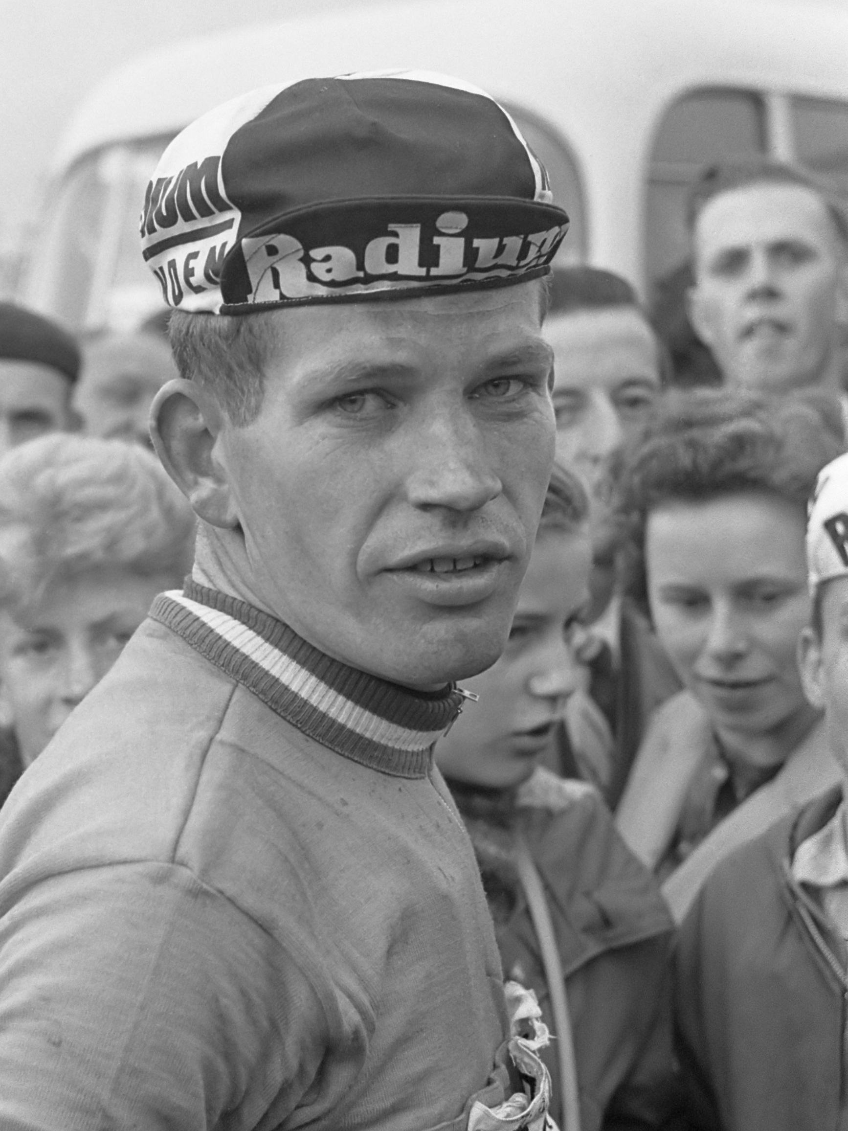 Van Kerkrade naar Zundert. Dick Enthoven in de oranje trui 23 mei 1961